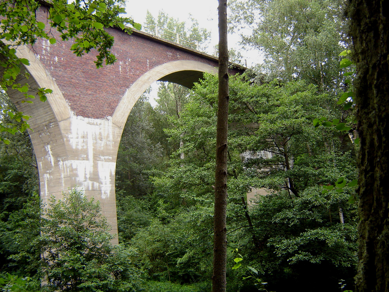 Betonowo-ceglany most kolejowy na Wdzie w pobliżu wsi Leosia.